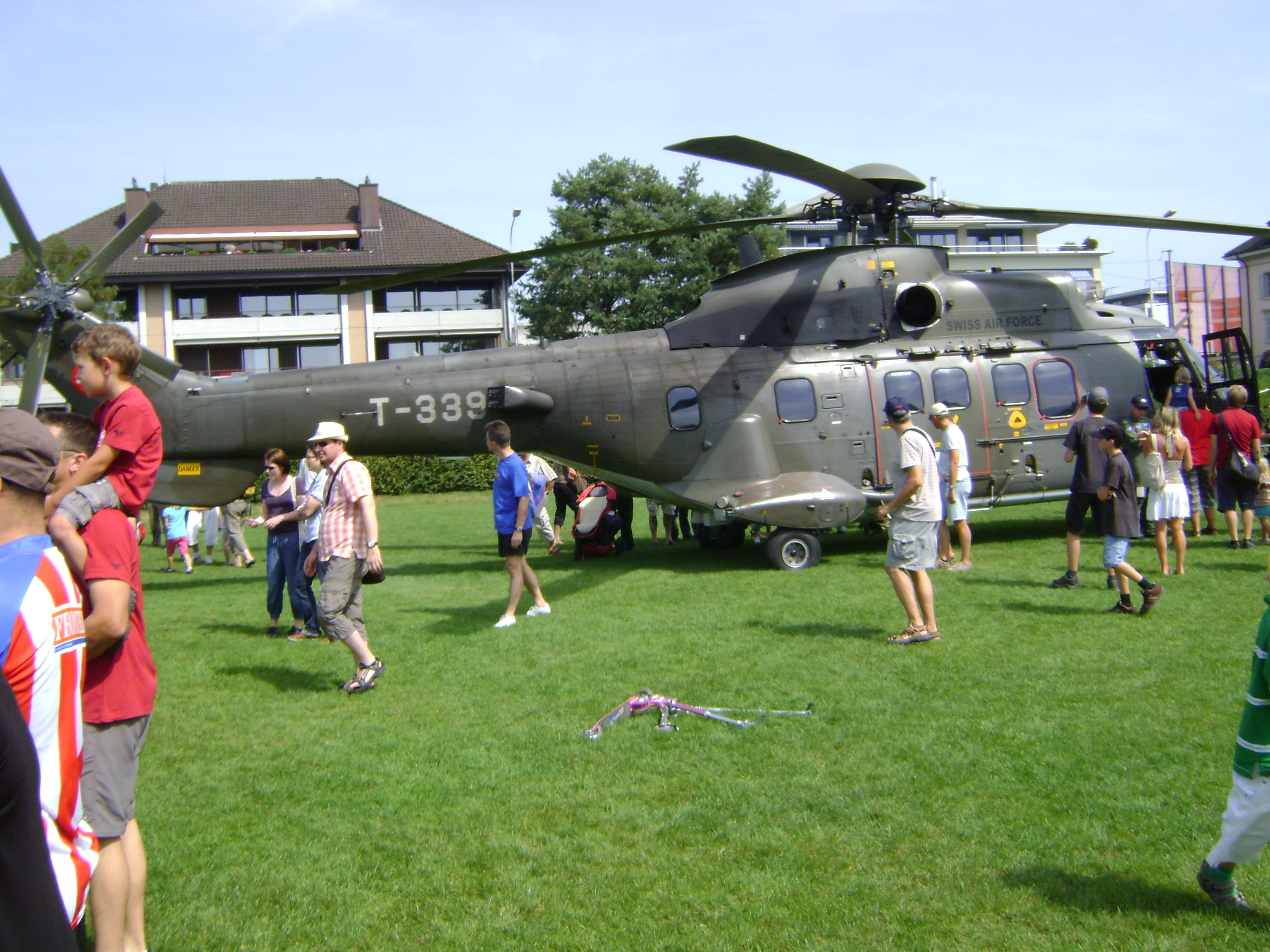 Swiss Air Force Cougar